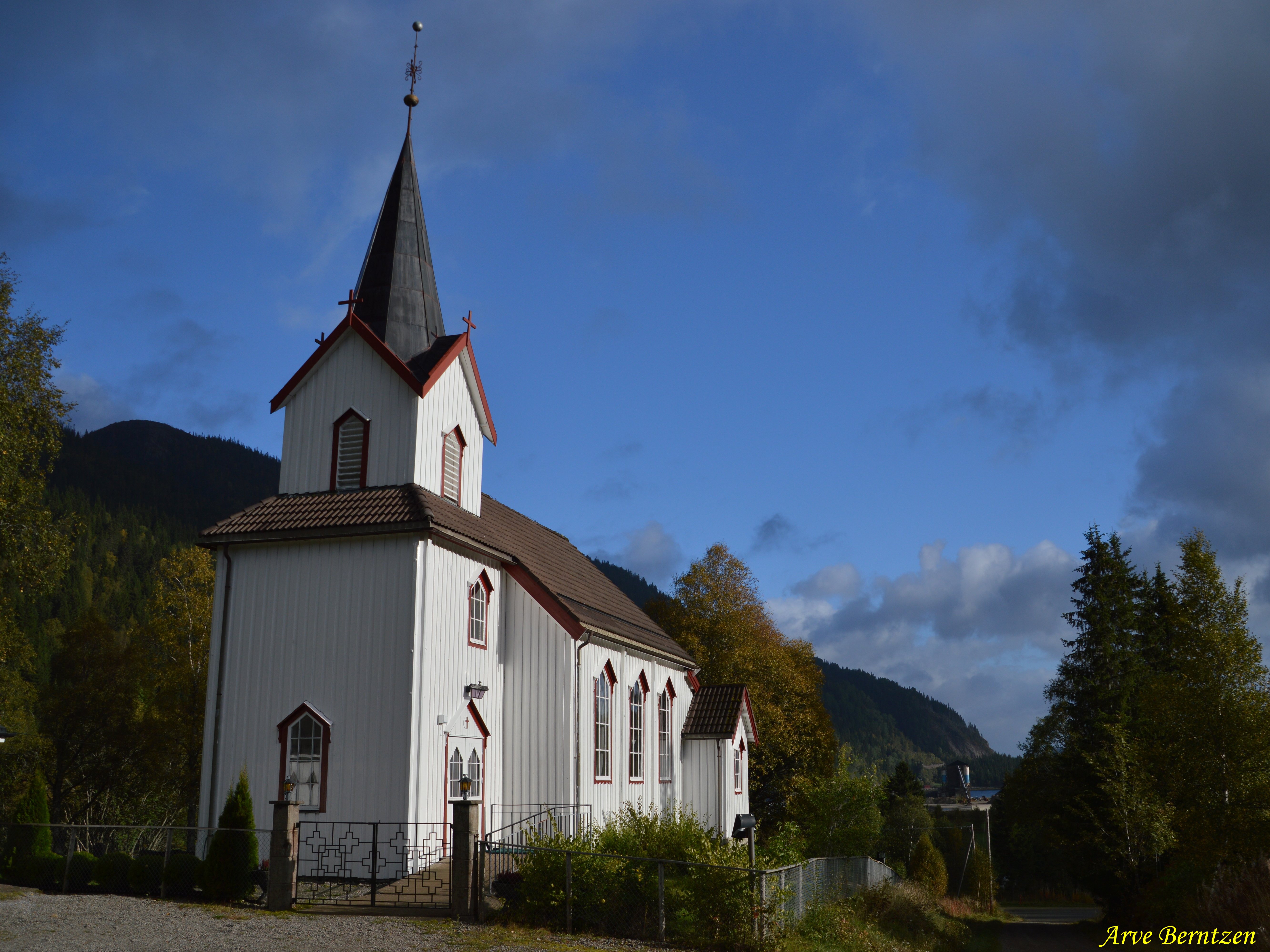 Fines kirke